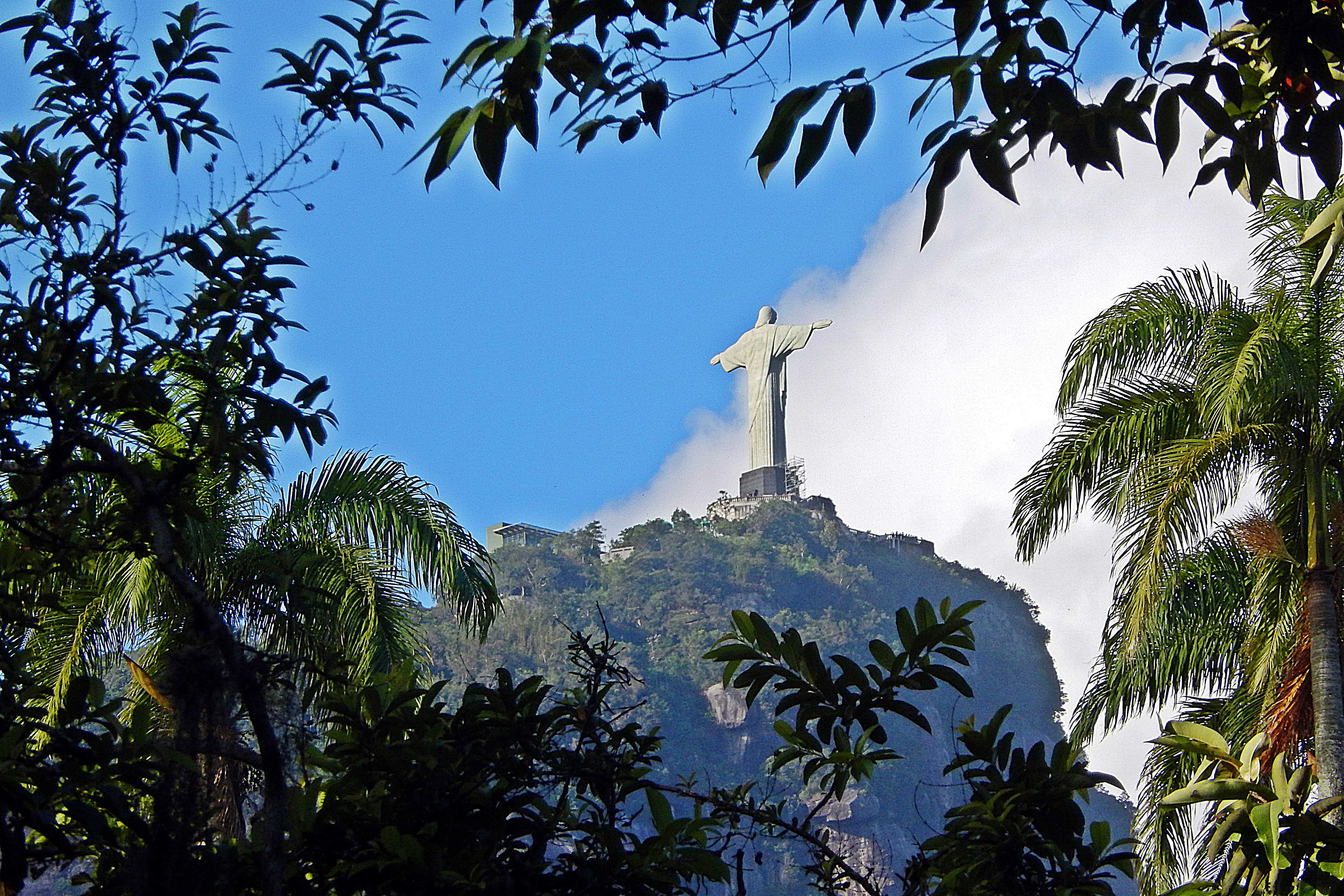 Cristo Redentor, estátua erigida no Penhasco do Corcovado.